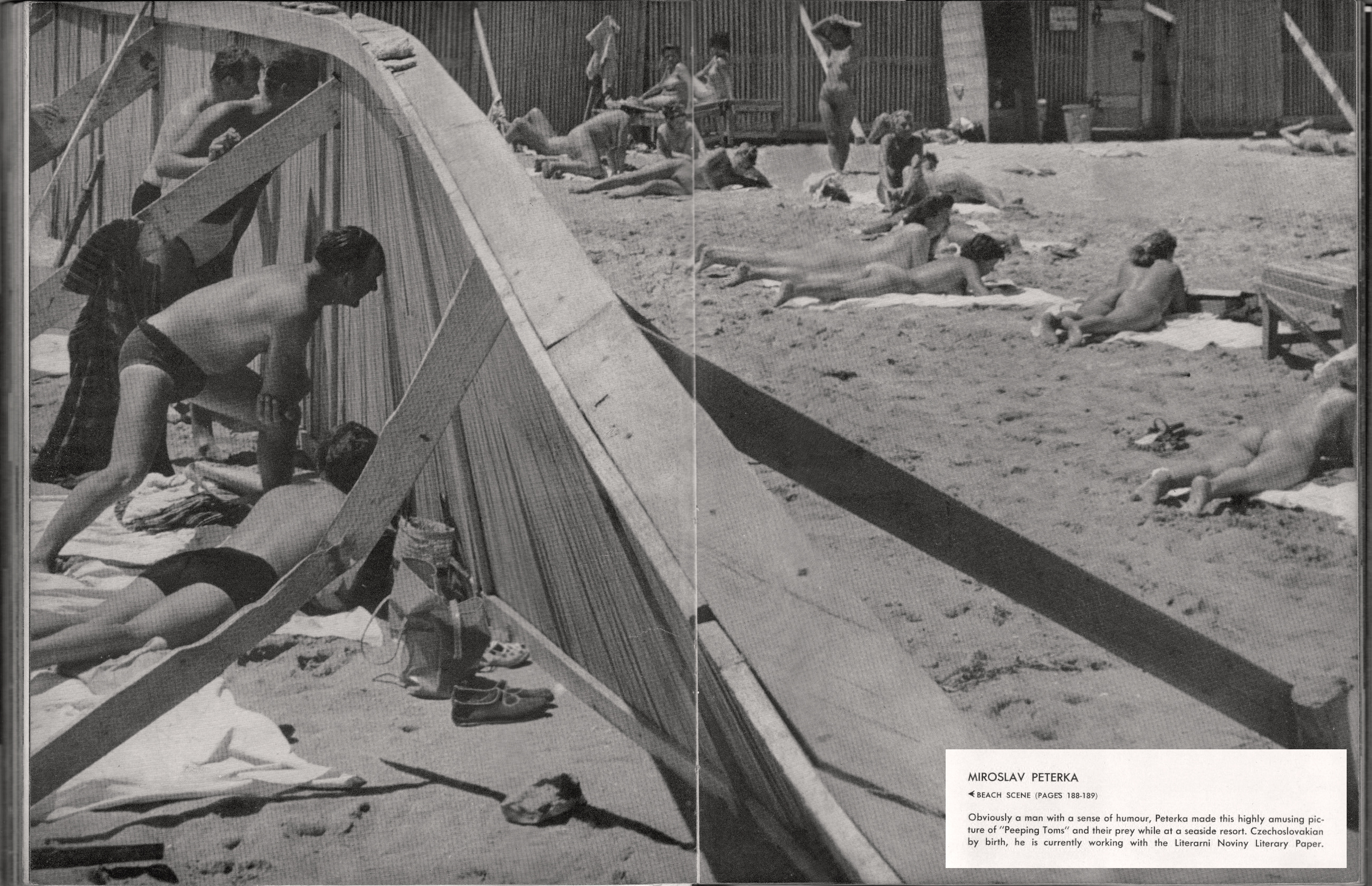 Evina Plaž z časopisu U.S. Camera 1960